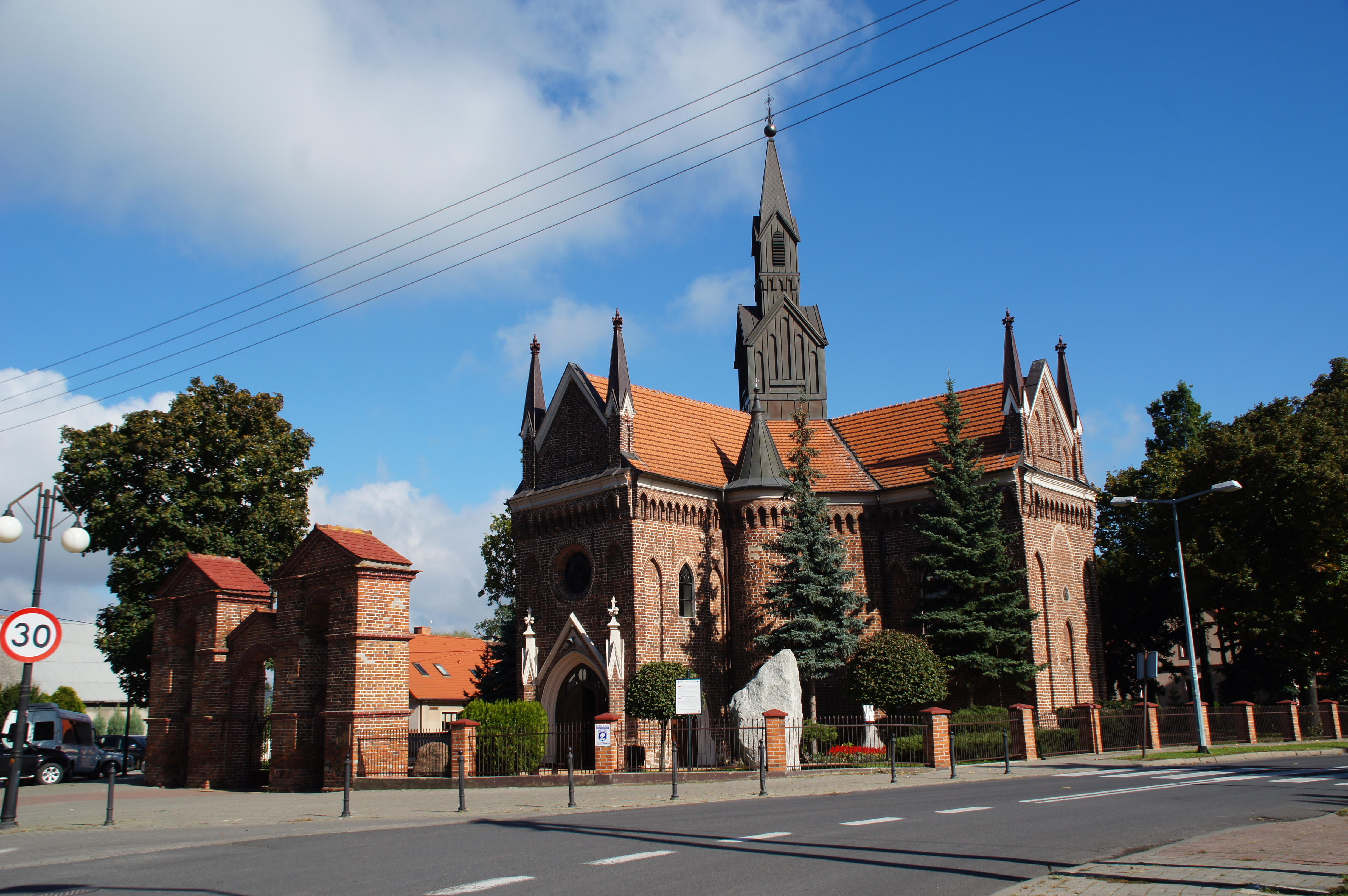 Konin, kościół par. p.w. św. Andrzeja, 1411-1424